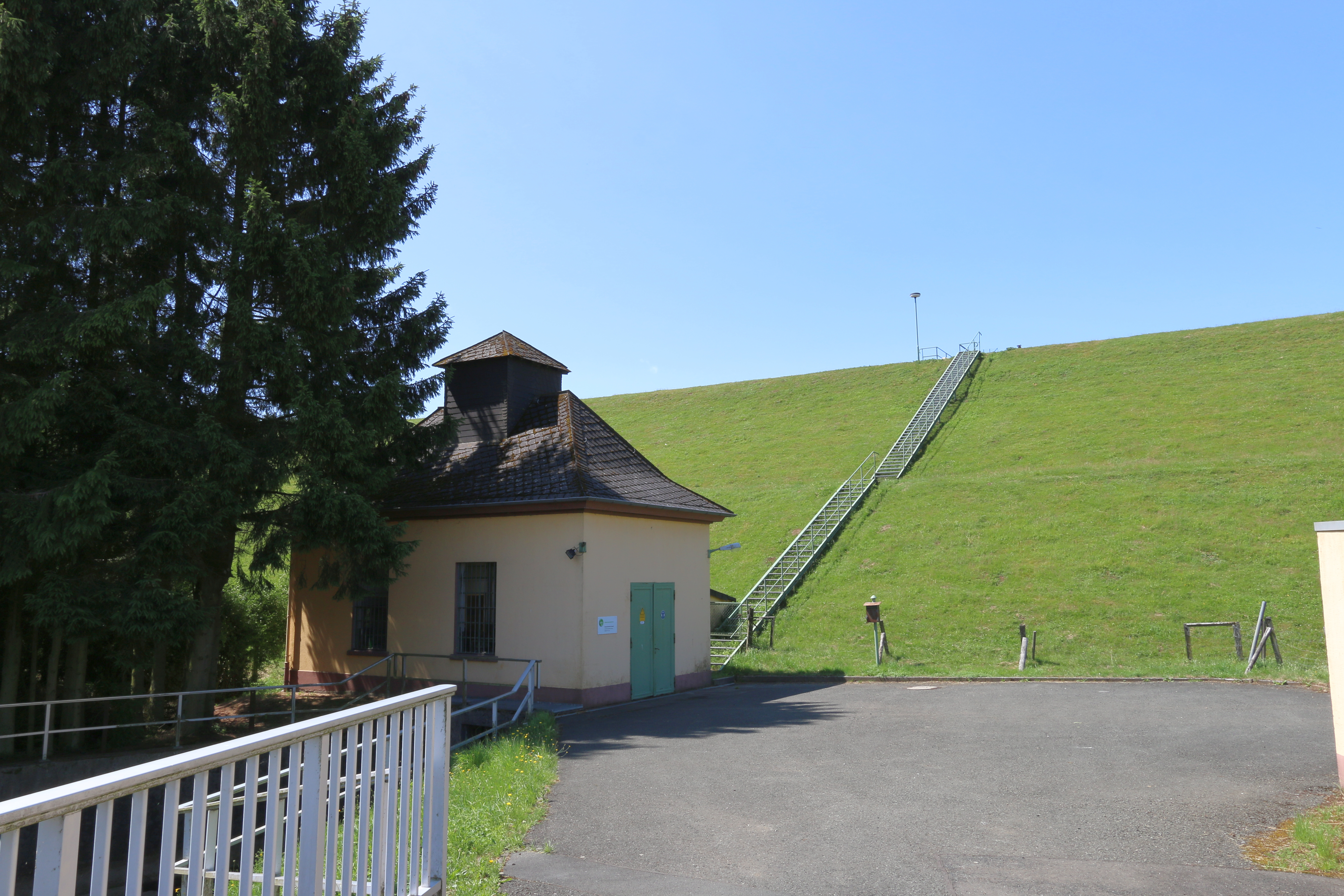 Driedorf, Lahn-Dill-Kreis: Stauanlage des Stausee Driedorf